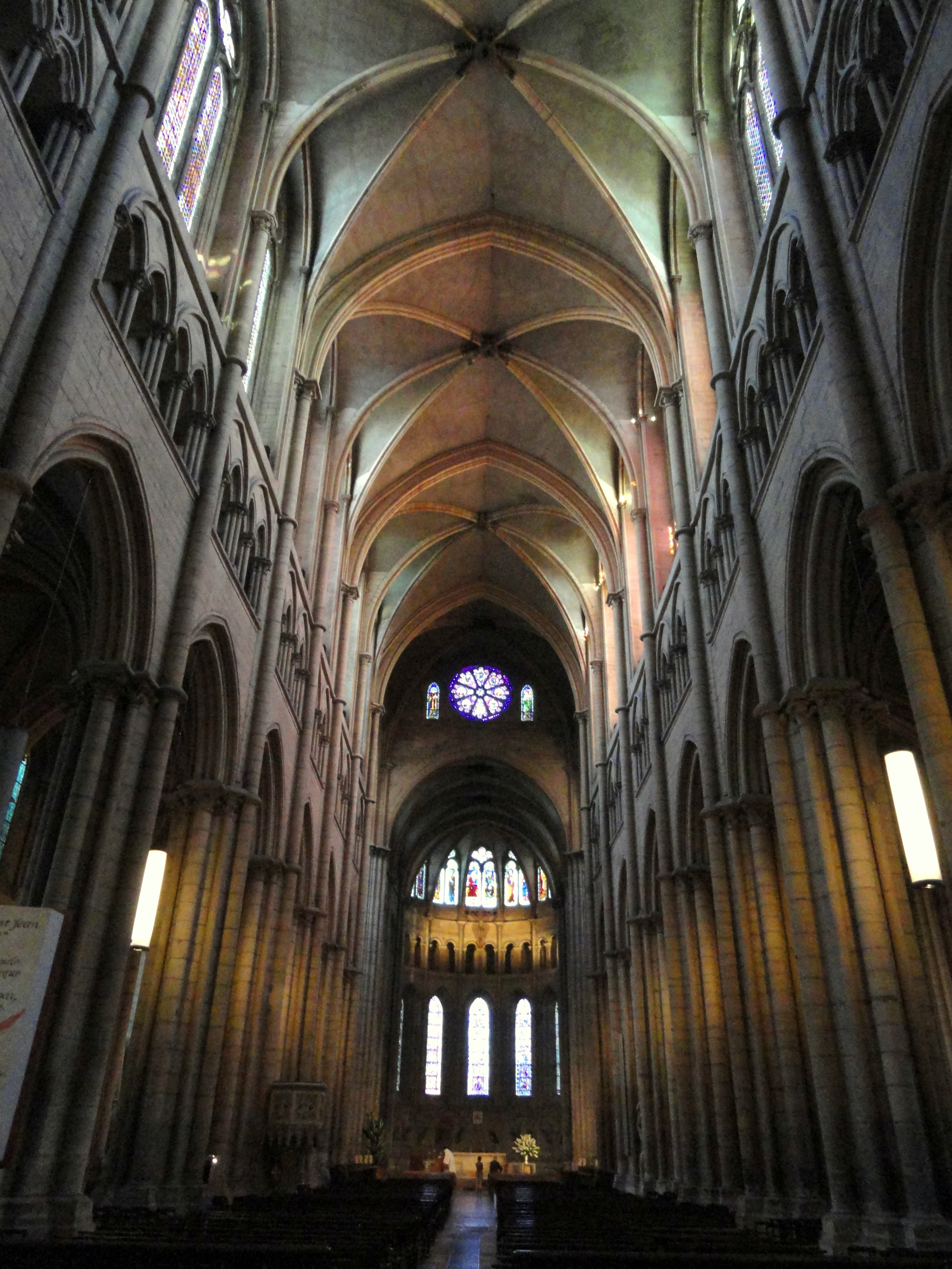 Cathédrale Saint-Jean de Lyon, Lyon, France.